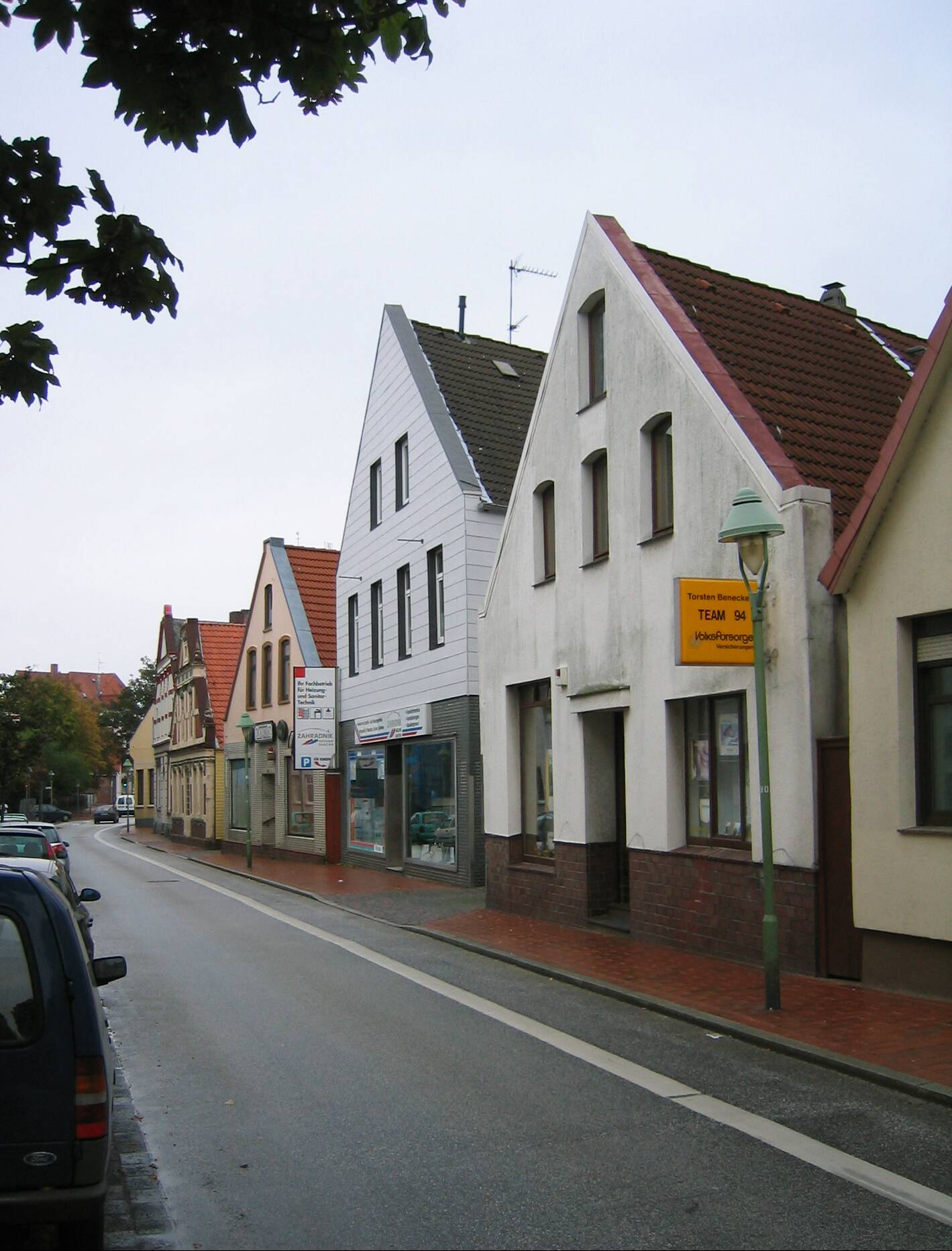 Lehe: Lange Straße in Alt-Lehe, die Keimzelle Lehes